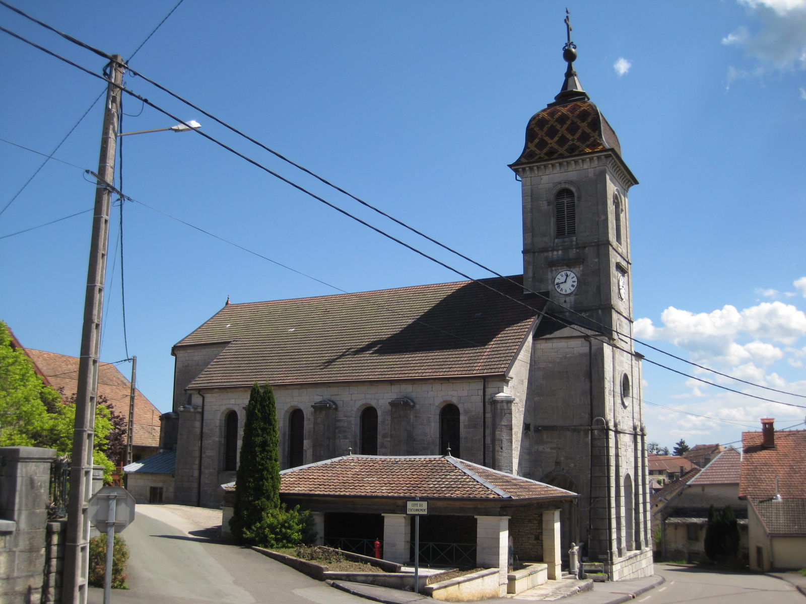 Église Saint-Pierre et Saint-Paul de Vellevans - Franche Comté